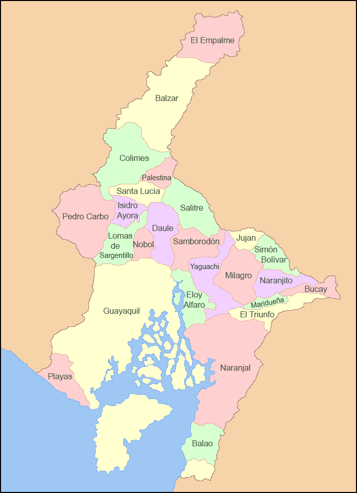 Mapa de los cantones de la Provincia del Guayas